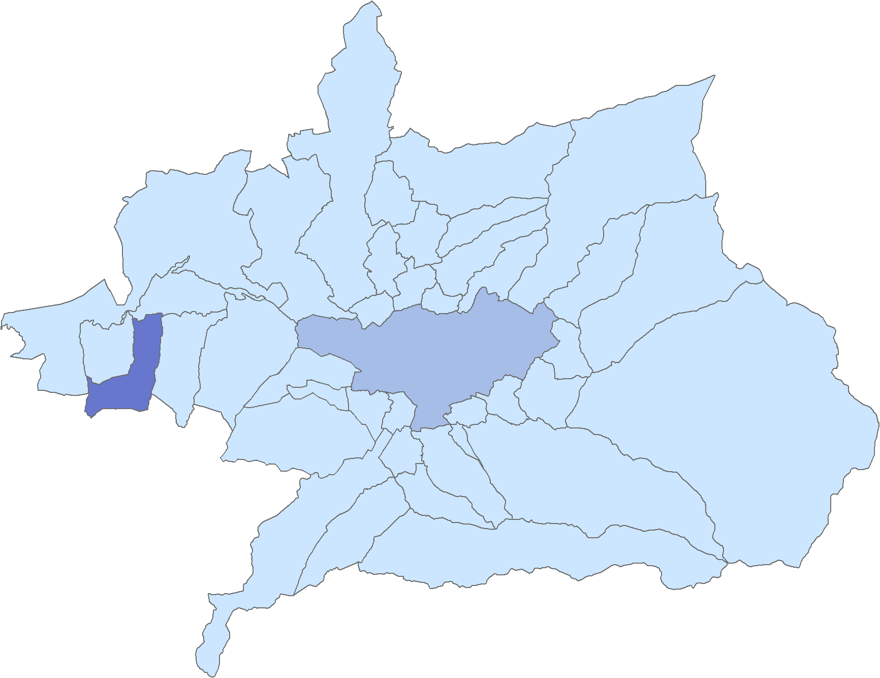 Situación del municipio de Cijuela respecto a la comarca de la Vega de Granada, en España.